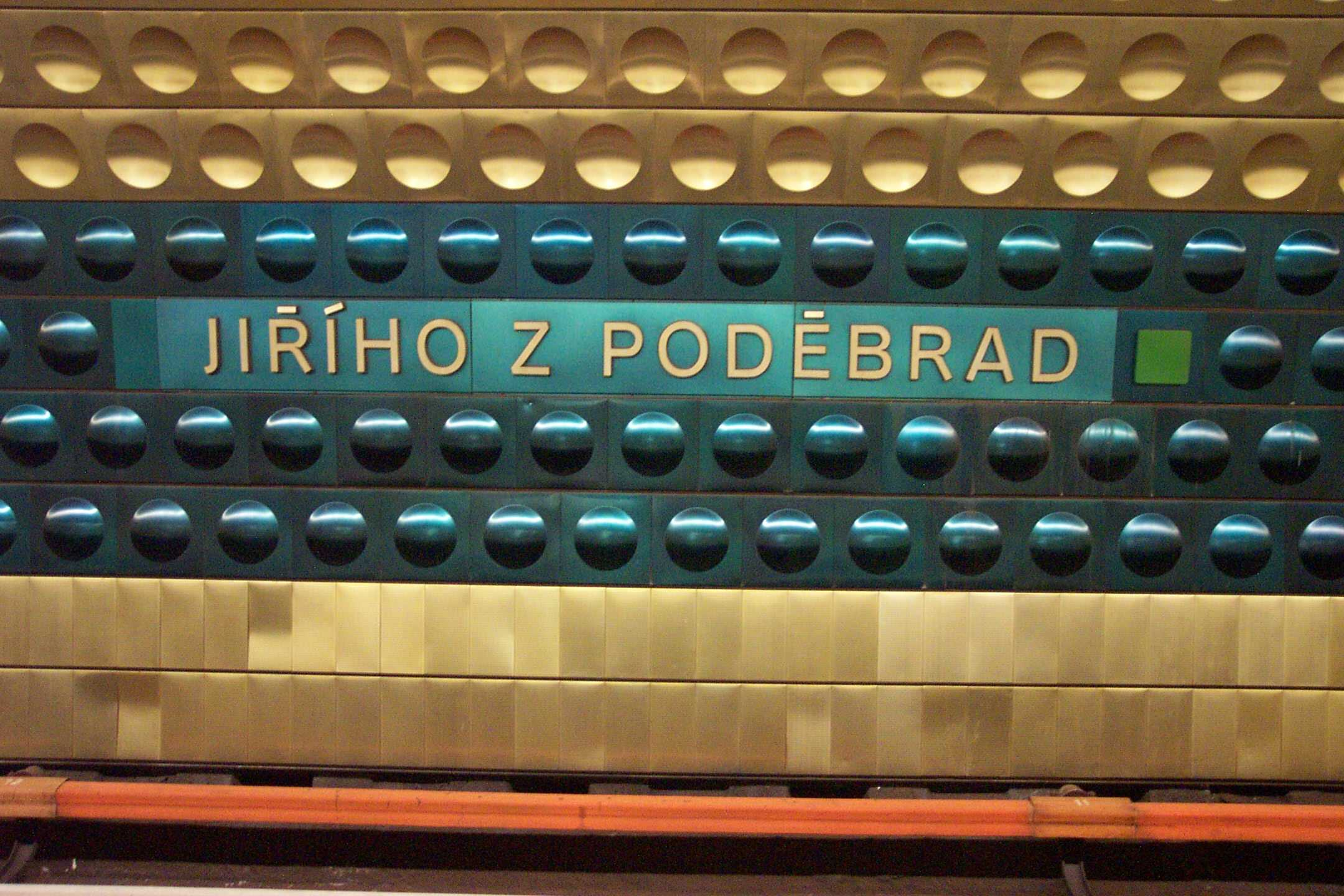 Sign in station Jiřího z Poděbrad, Prague - Nápis ve stanici Jiřího z Poděbrad v Praze